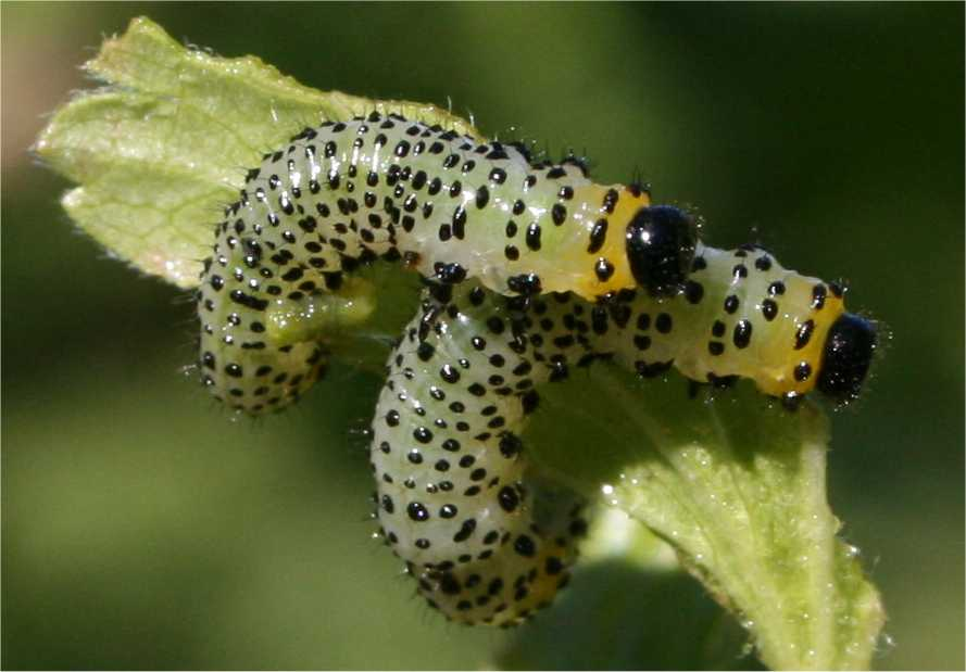 Nematus ribesii caterpillar